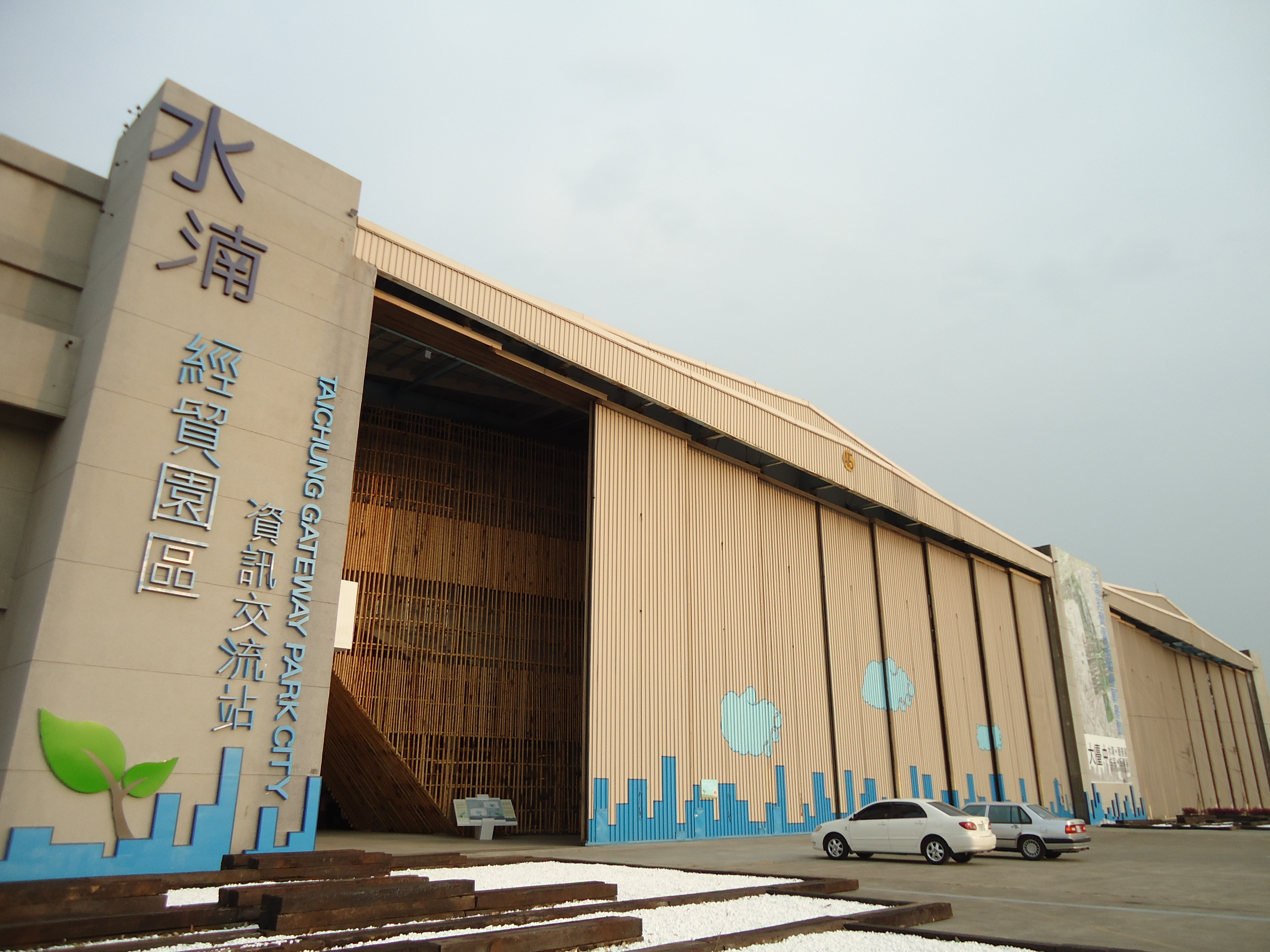 中文（台灣）: 台中水湳經貿園區願景館